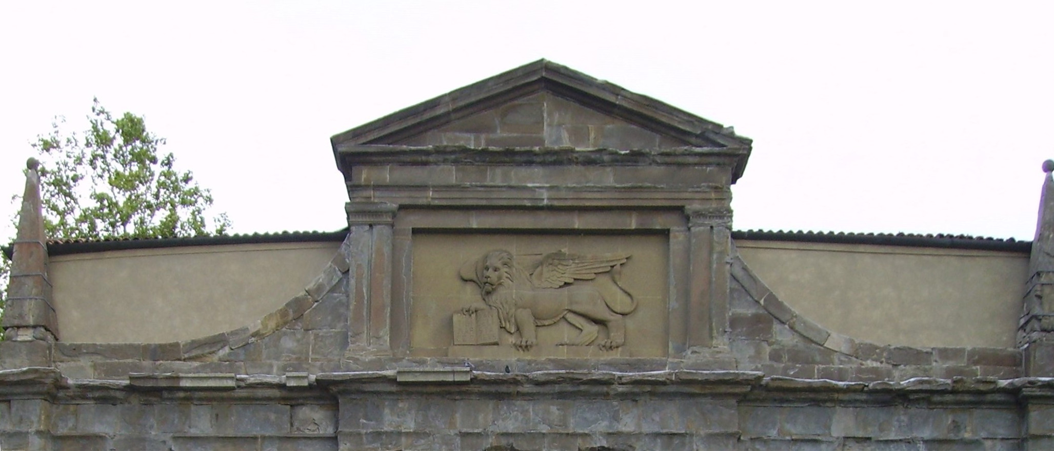 Particolare della foto preesistente della parte superiore di Porta Sant'Agostino, con i due pinnacoli e il leone di San Marco